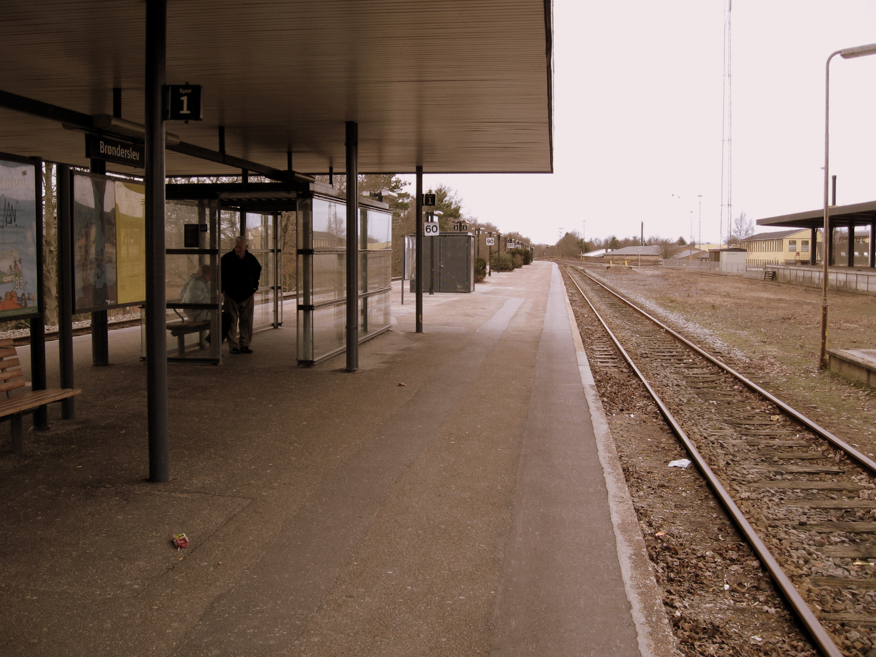 Brønderslev Station er en dansk jernbanestation i Brønderslev. Stationen har InterCityLyn-forbindelser til Frederikshavn og København. 57° 16' 14.89" N 9° 56' 31.45" E